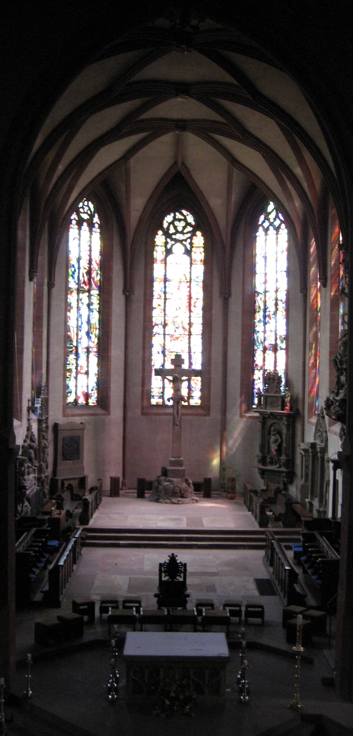 Chor und Volksaltar in der Stiftskirche Baden-Baden